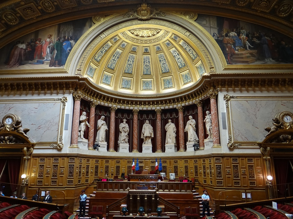 Palais du Luxembourg .